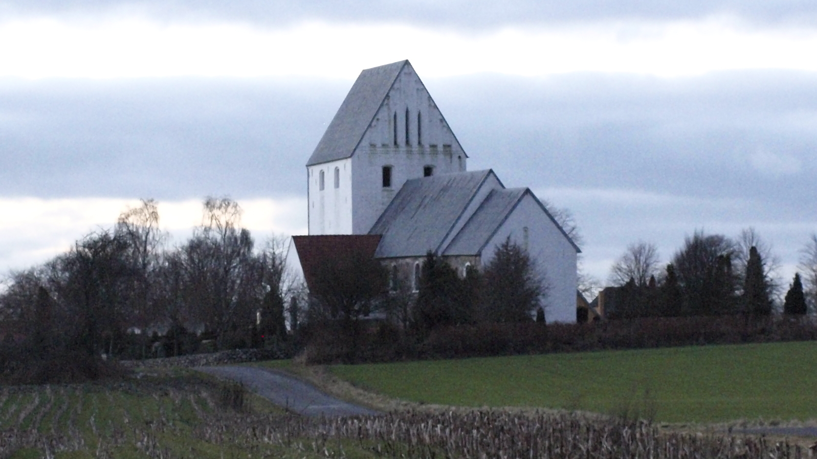 Lejrskov Kirke i januar 2017